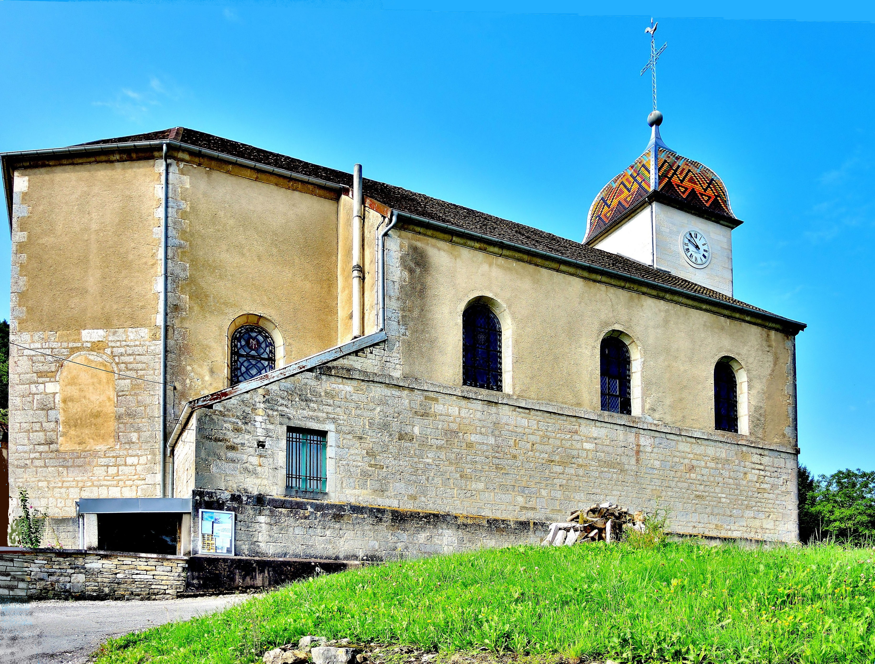 Eglise Saint Michel de Roulans. Doubs